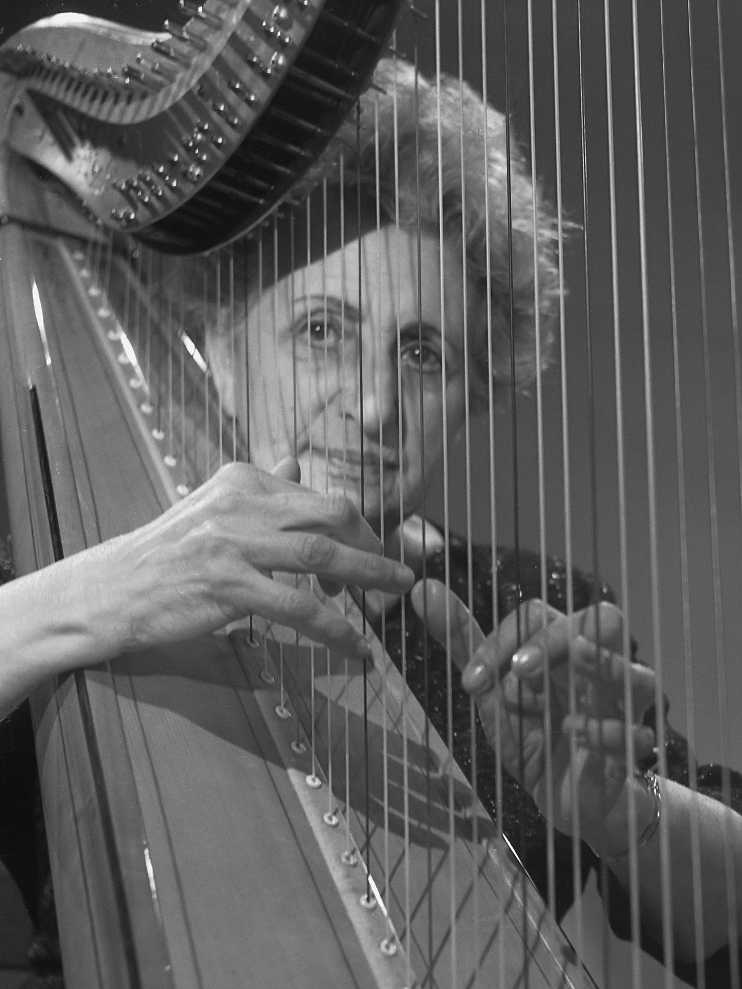 TV Muziekexpress. Rosa Spier en Willem O. Duys 6 november 1961